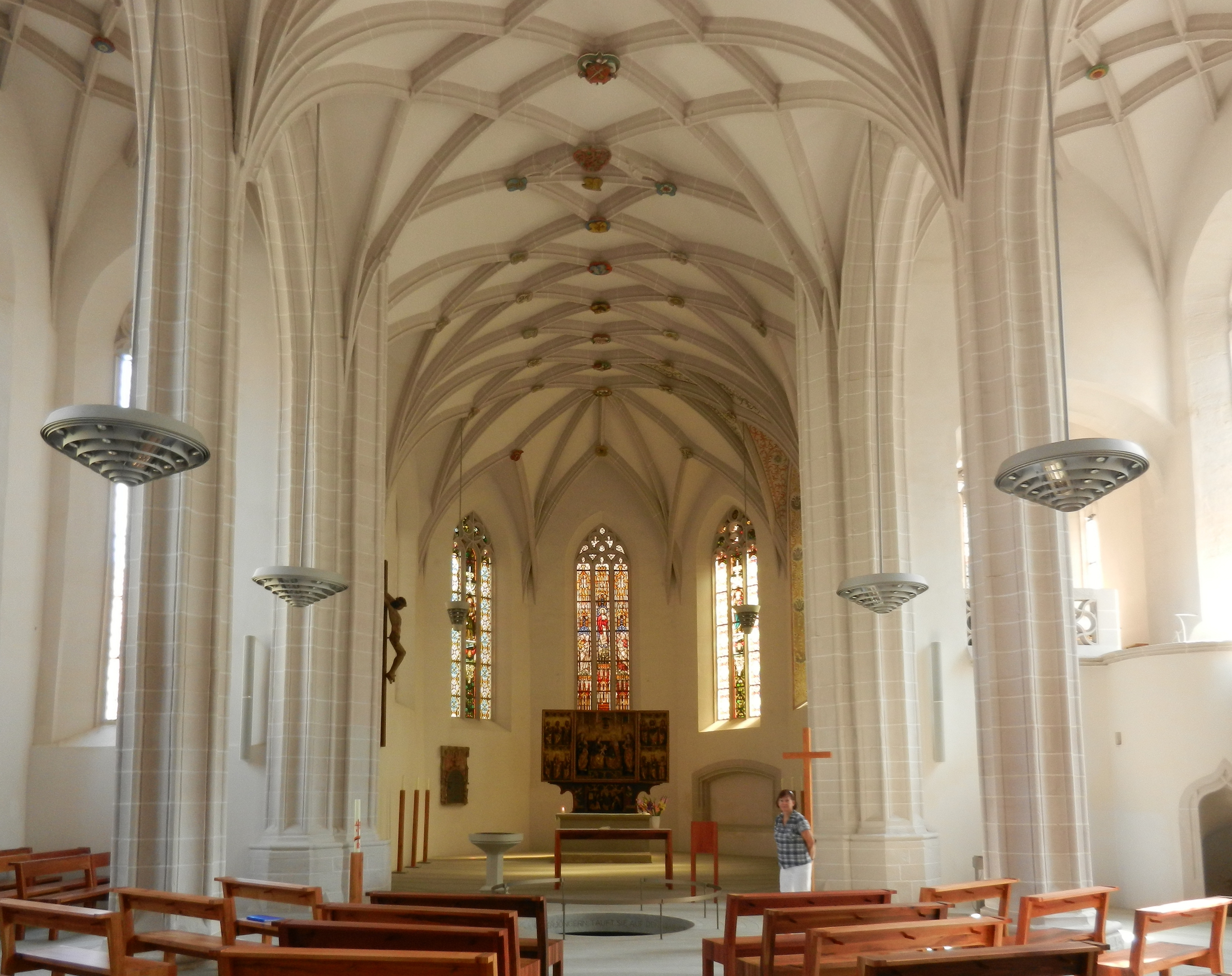 Eisleben, St.-Petri-Pauli-Kirche, Inneres